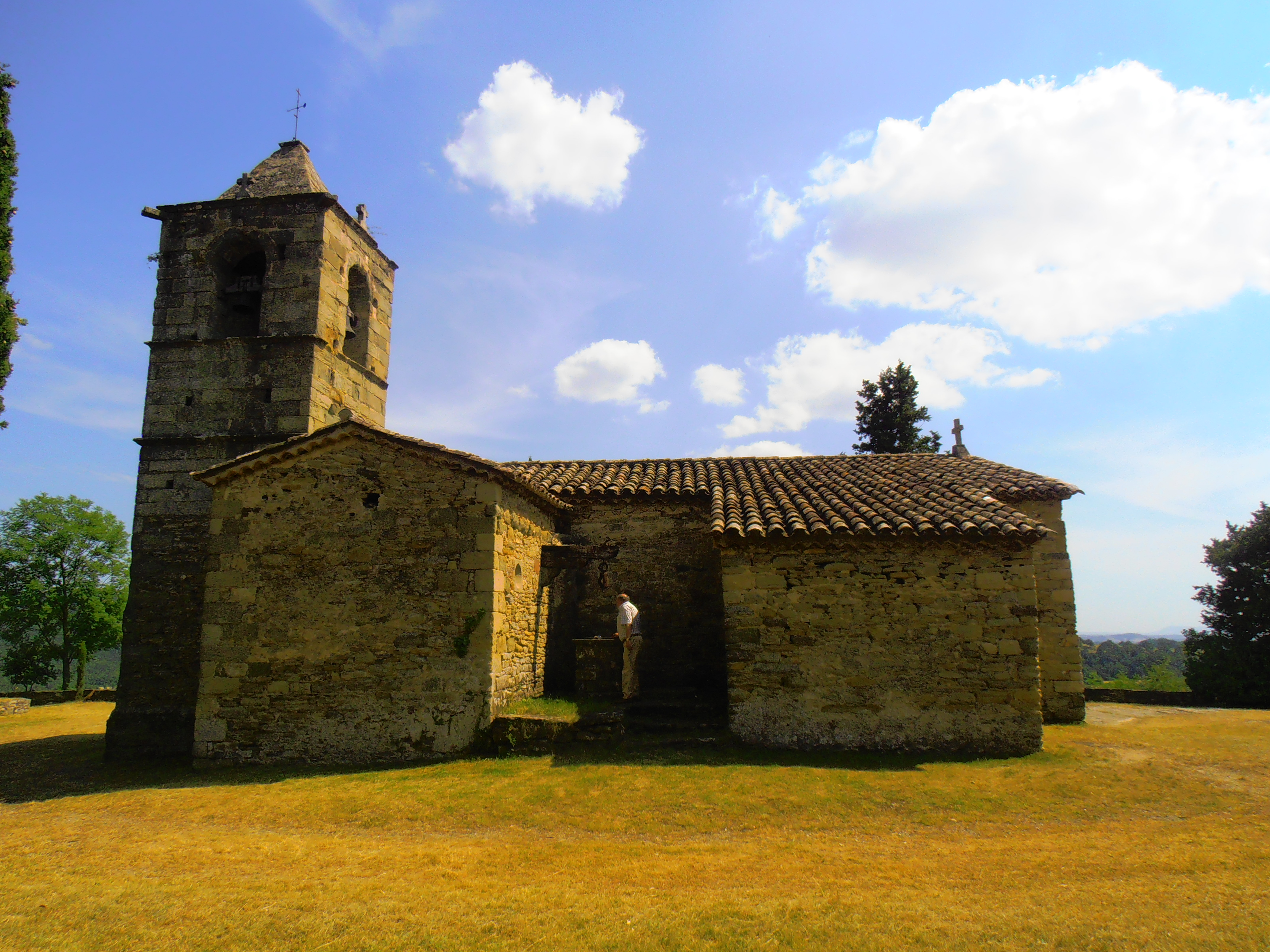 El pou d'aigua al mig de l'ermita